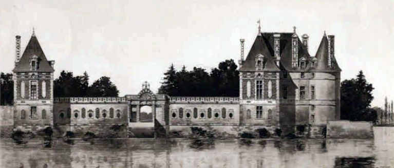 Selles-sur-Cher : vue du château par l'architecte P. Chauvallon, juin 1912. Héliogravure sépia extraite de L'Architecte, planche XLV, 1913. Version retouché (rotation, découpe et niveaux).